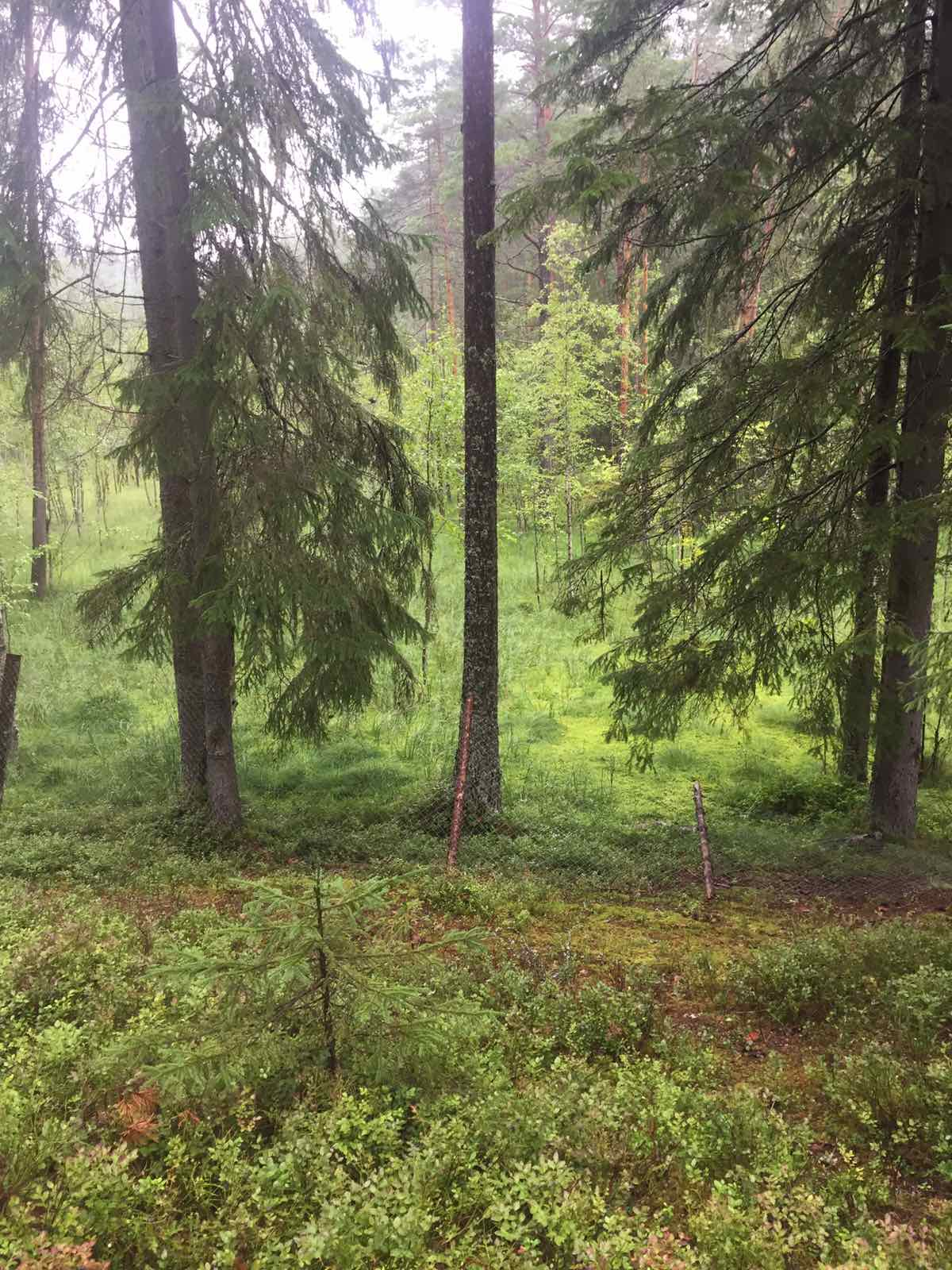 Pine forest in the north of the Leningrad region